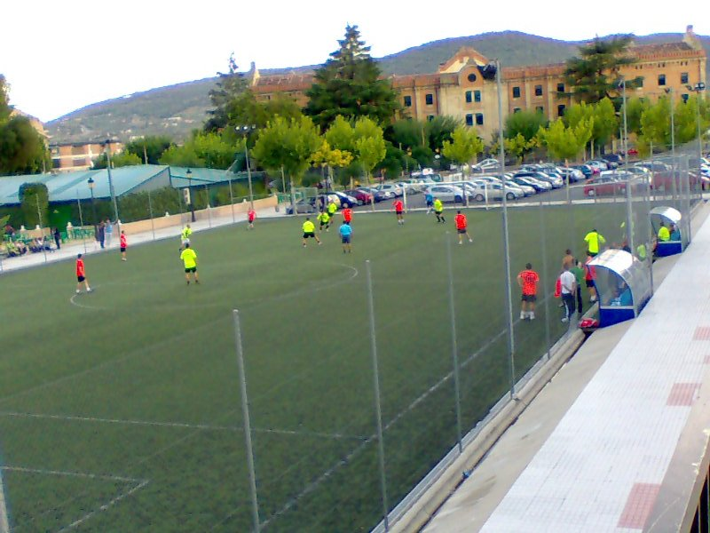 Competición deportiva en instalaciones de Plasencia